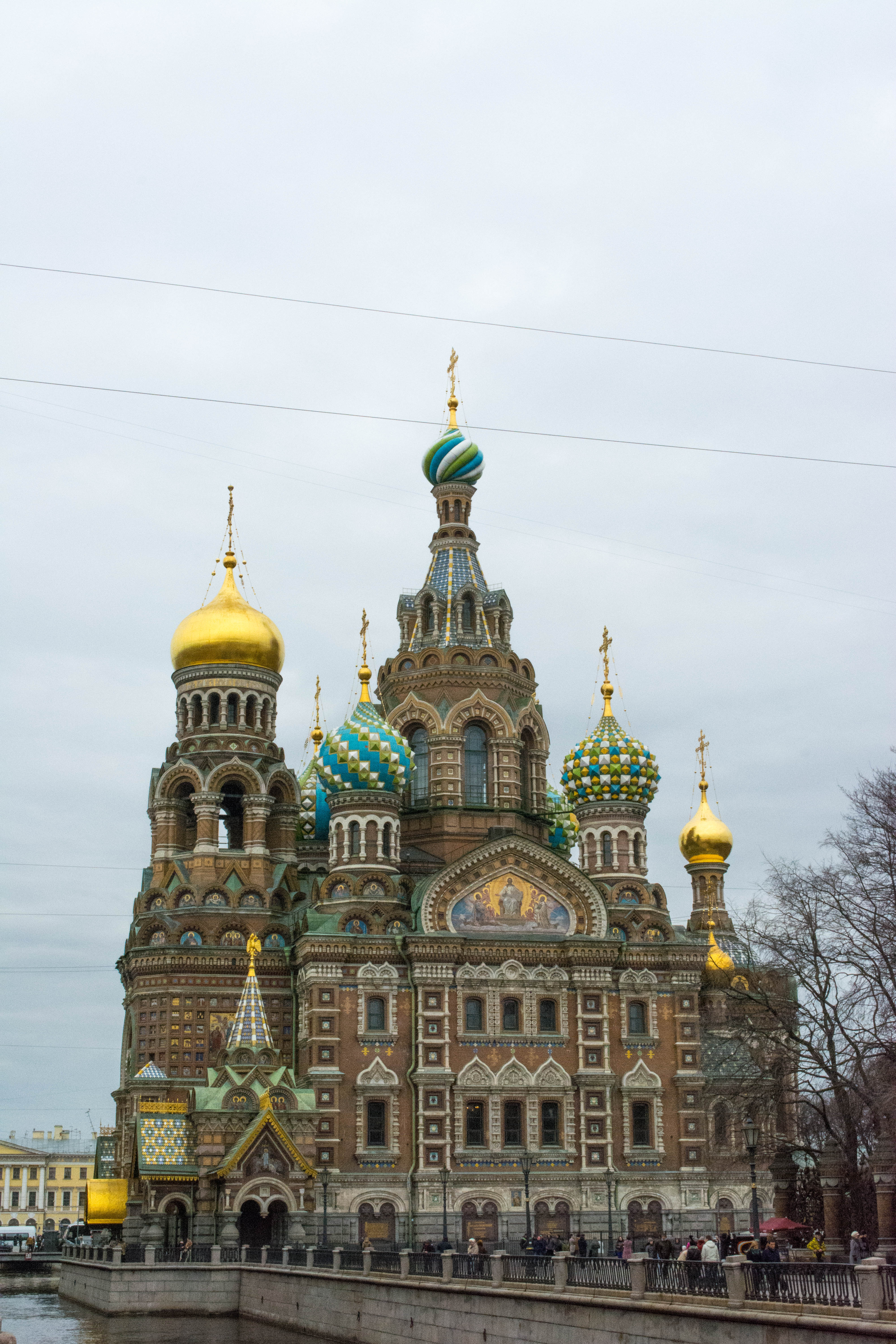 Собор Воскресения Христова («Спас на крови») (Санкт-Петербург и Лен.область, Санкт-Петербург, канала Грибоедова наб., 2-а)